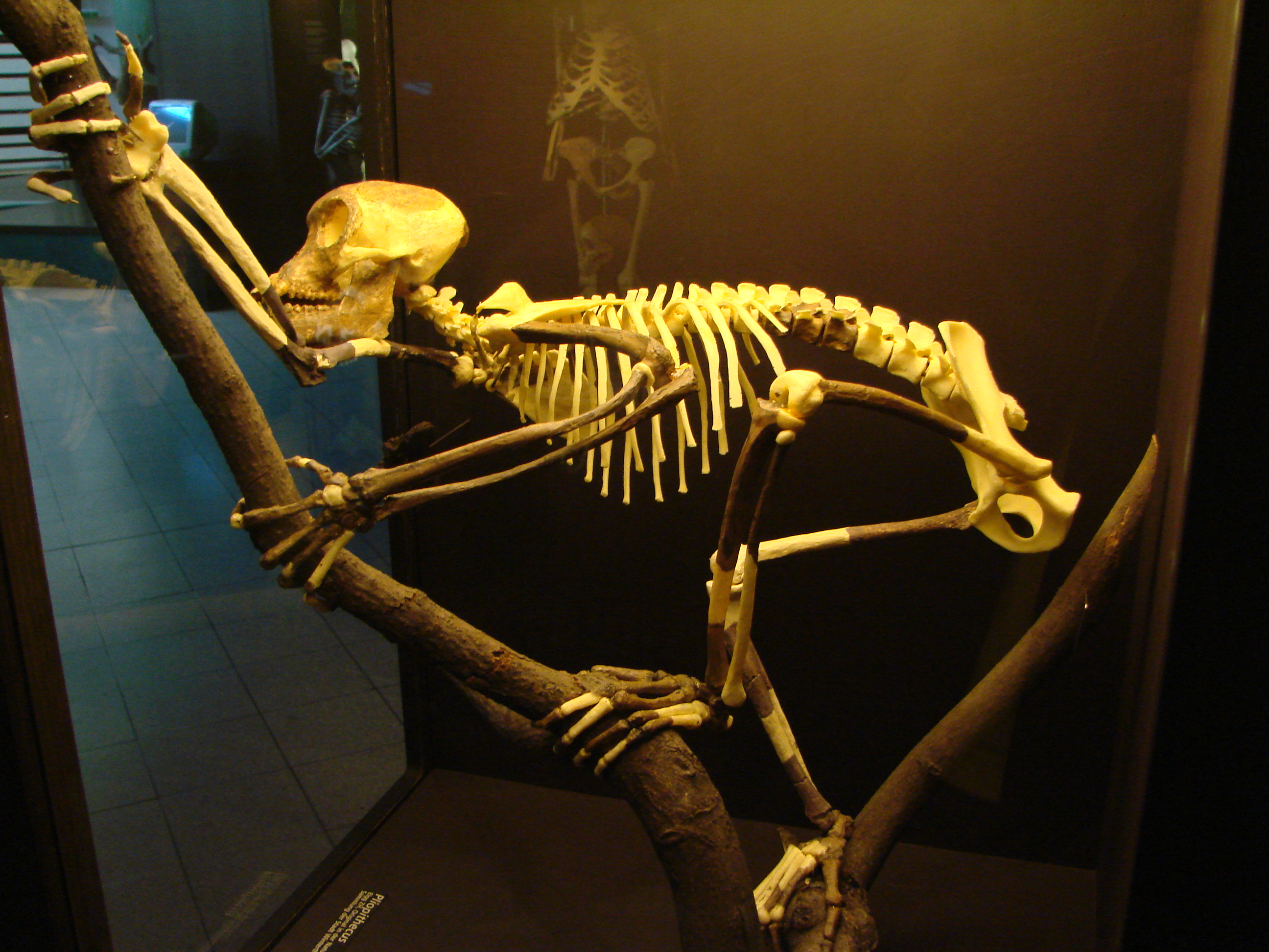 Muséum d'Anthropologie, campus universitaire d'Irchel, Université de Zurich (Suisse) : Proconsul